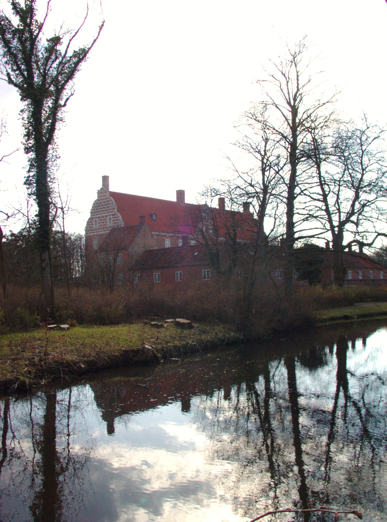 Gyldensteen Palace (Gyldensteen Slot) near Bogense on Northern Funen (Nordfyn) in Denmark